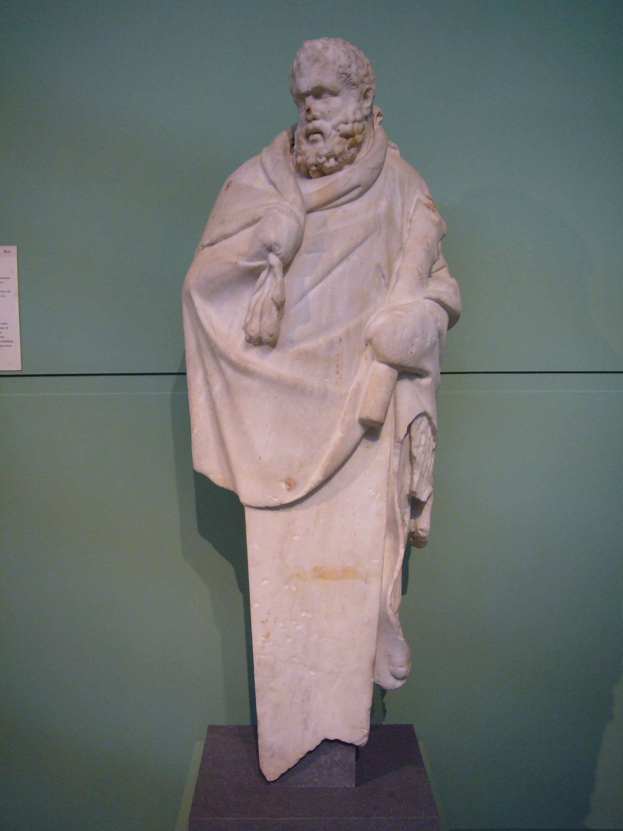 Centrale Montemartini a Roma: Erma di Ercole barbato (scavato agli Horti Sallustiani, 1890). La didascalia recita: "L'eroe è raffigurato in età matura e in atteggiamento pensoso, come un filosofo, nel ruolo che aveva acquisito dall'inizio dell'età ellenistica come protettore delle discipline che univano l'esercizio del corpo a quello della mente. L'opera risale ad età augustea."